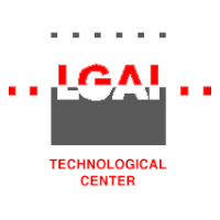 Logotip anterior a la privatización del Laboratori General d'Assaigs i Investigacions